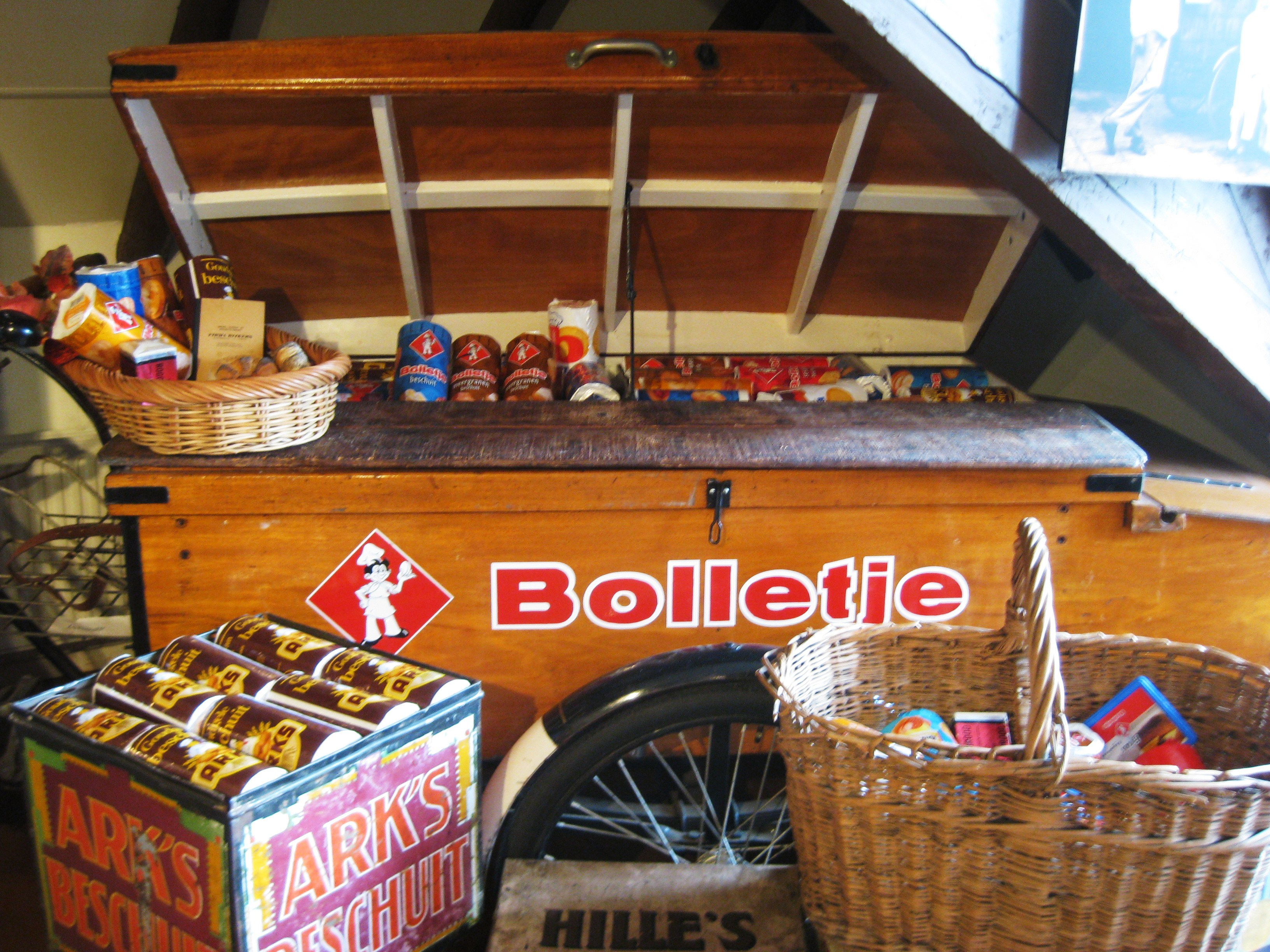 Voorbeeld van de bakfiets waarmee vroeger beschuit gevent werd in het Bolletjemuseum in Almelo